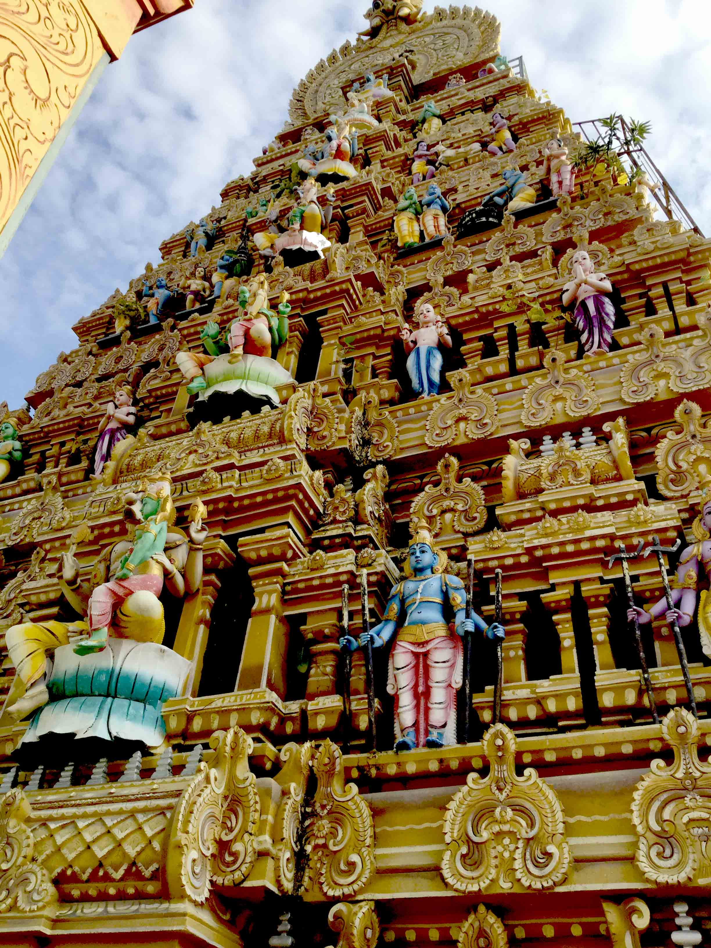 வல்லிபுர ஆழ்வார் ராஜகோபுரம் கோவில்